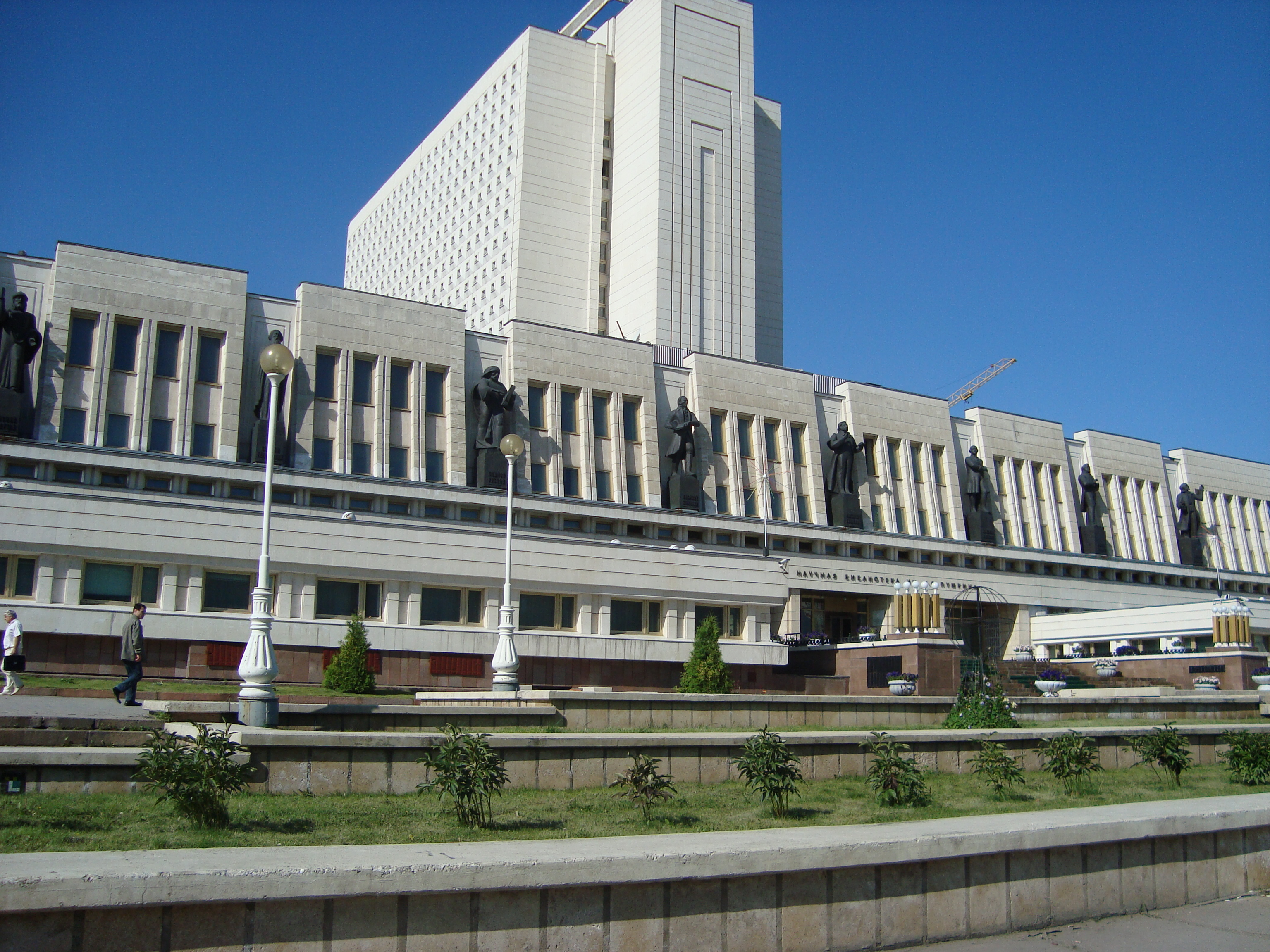 Омская государственная областная научная библиотека им. А. С. Пушкина